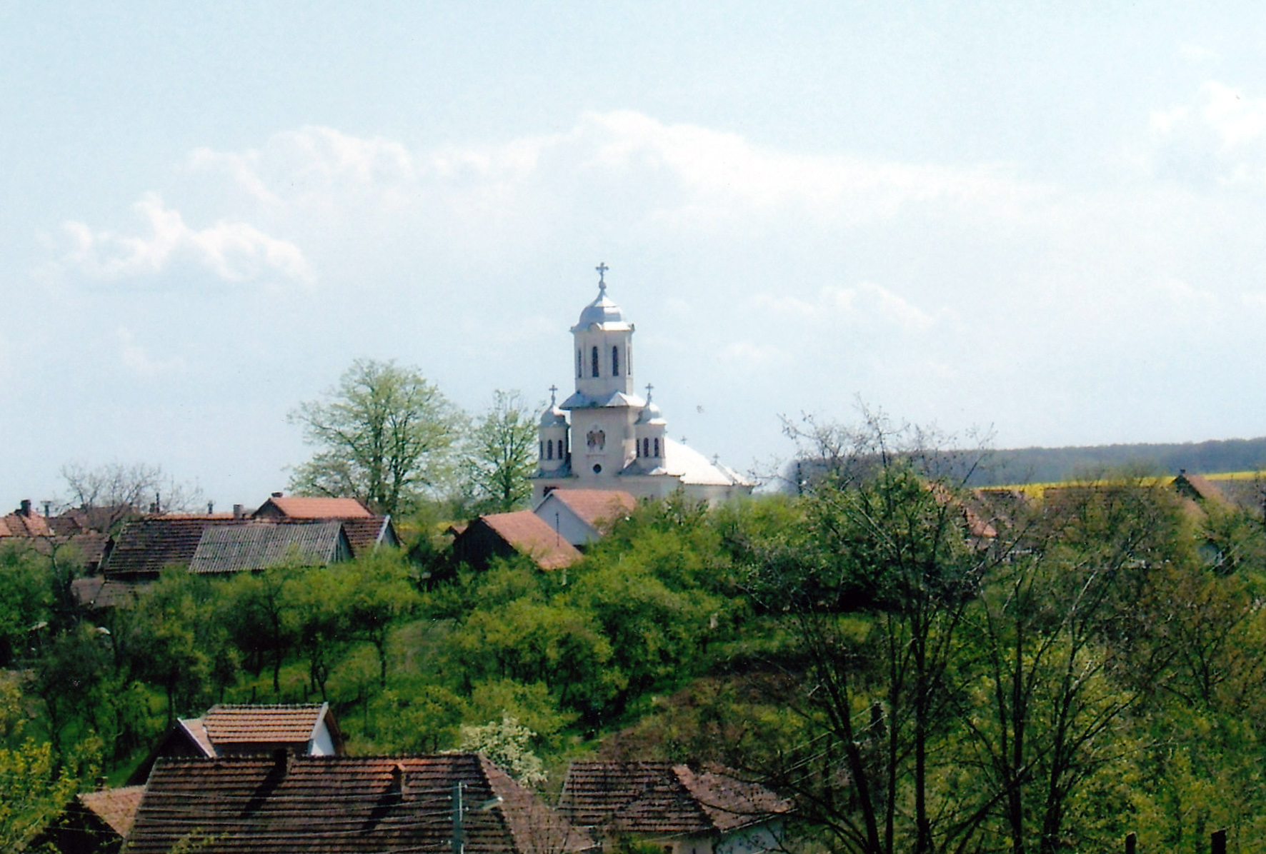 Biserica Ortodoxă nouă, finalizată în 1956, fotografiată în 2014